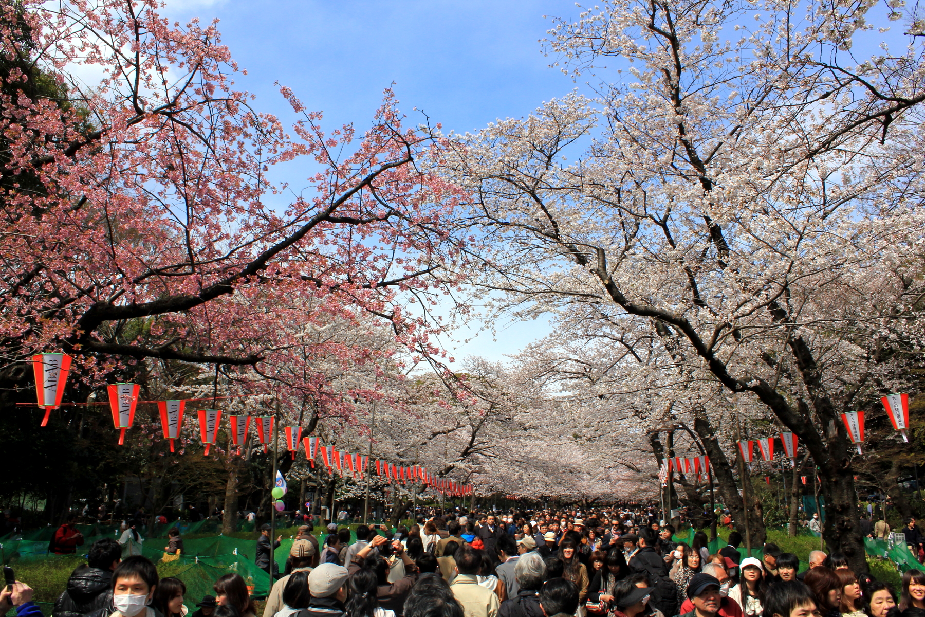 Hanami di Taman Ueno